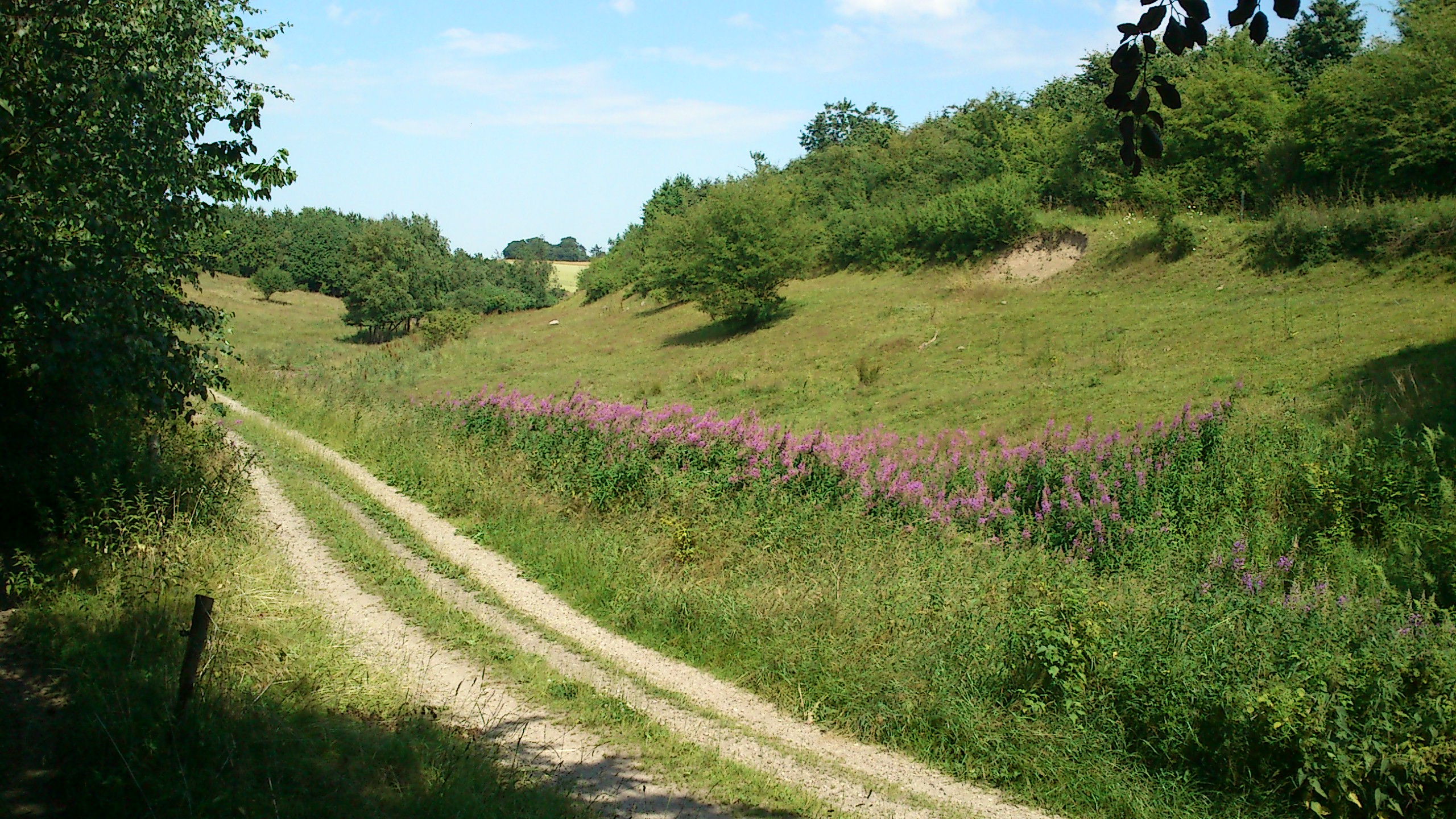 Hjuldalsvej slynger sig her gennem den nordlige del af Hjuldalen i den vestlige ende af Himmerigskov. Det meste af området er udlagt som private græsningsarelaer til kvæg.